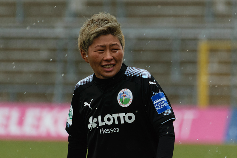 Kumi Yokoyama 2017 vs FC Bayern München